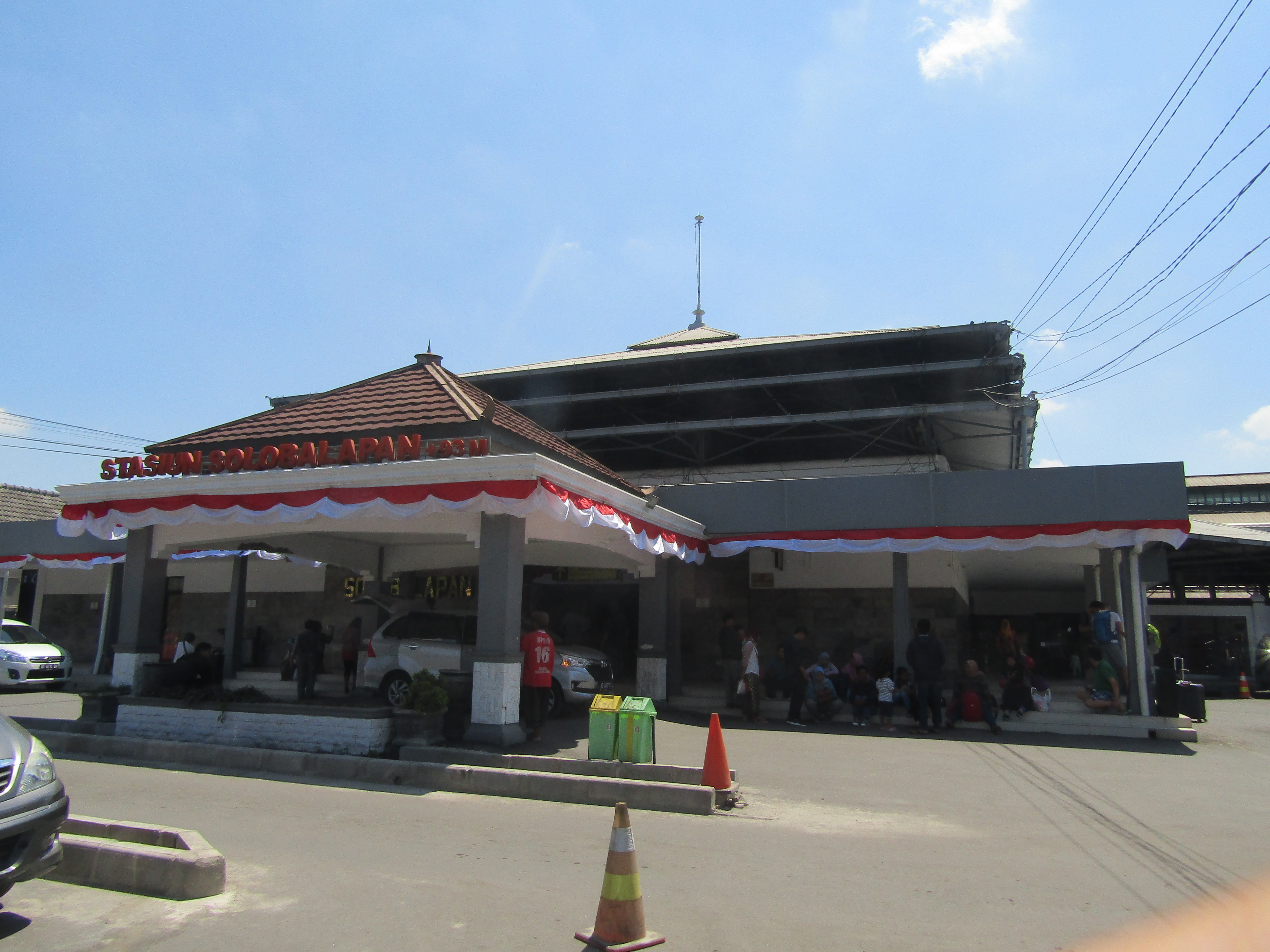 Tampak depan stasiun Solo Balapan, 2019